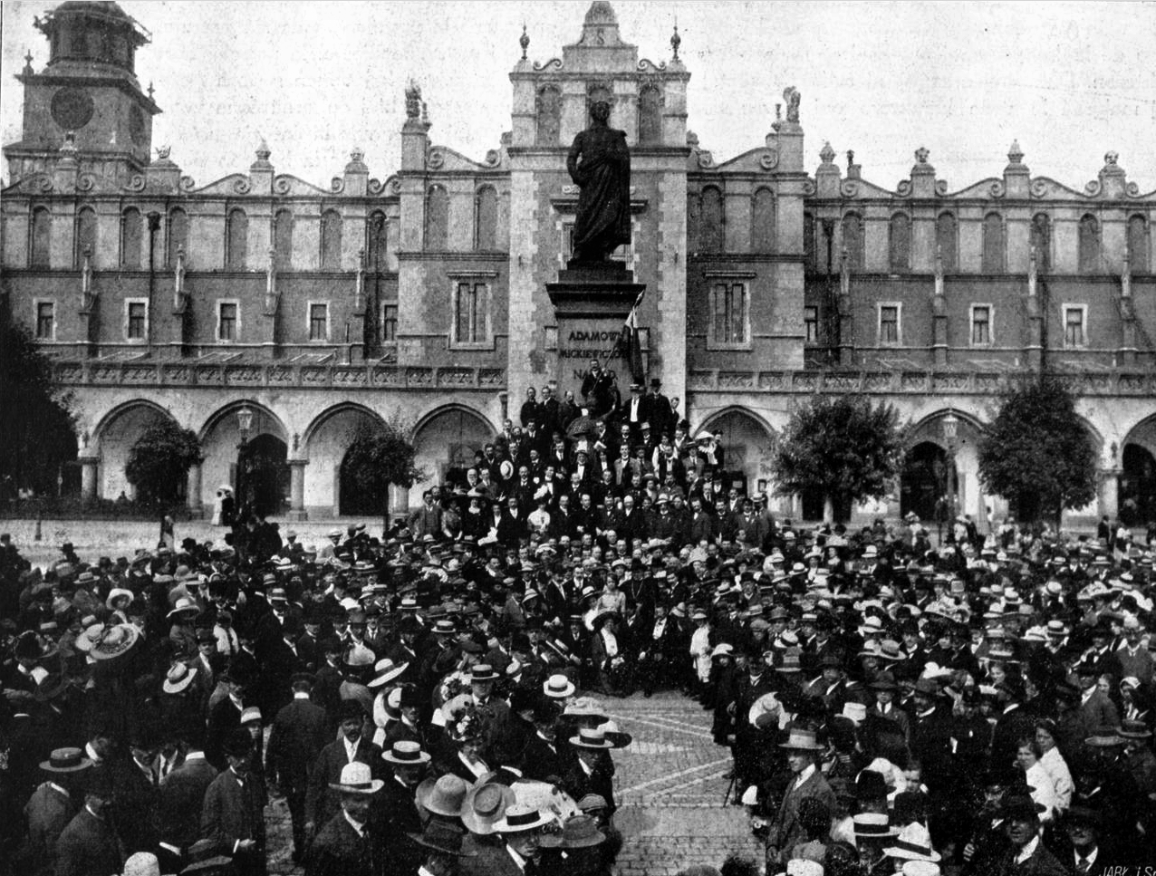 8. Esperanto-Weltkongress, Krakau 1912. Massenfoto der Teilnehmer am Marktplatz vor den Tuchhallen